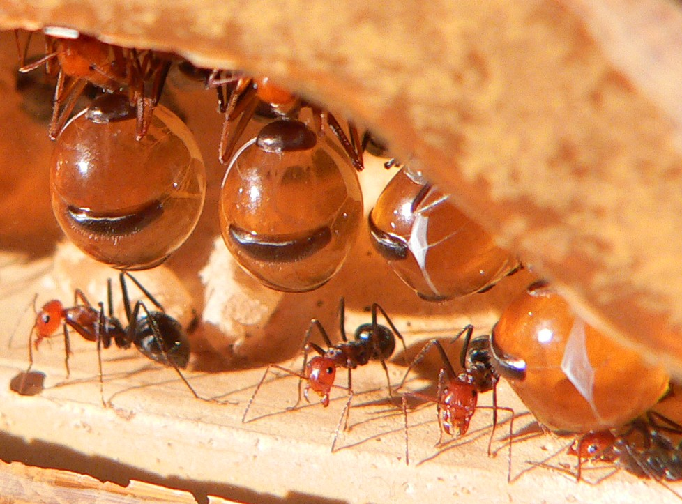 Formigas Pote de Mel - operarias especializadas em armazenar alimento em seus corpos